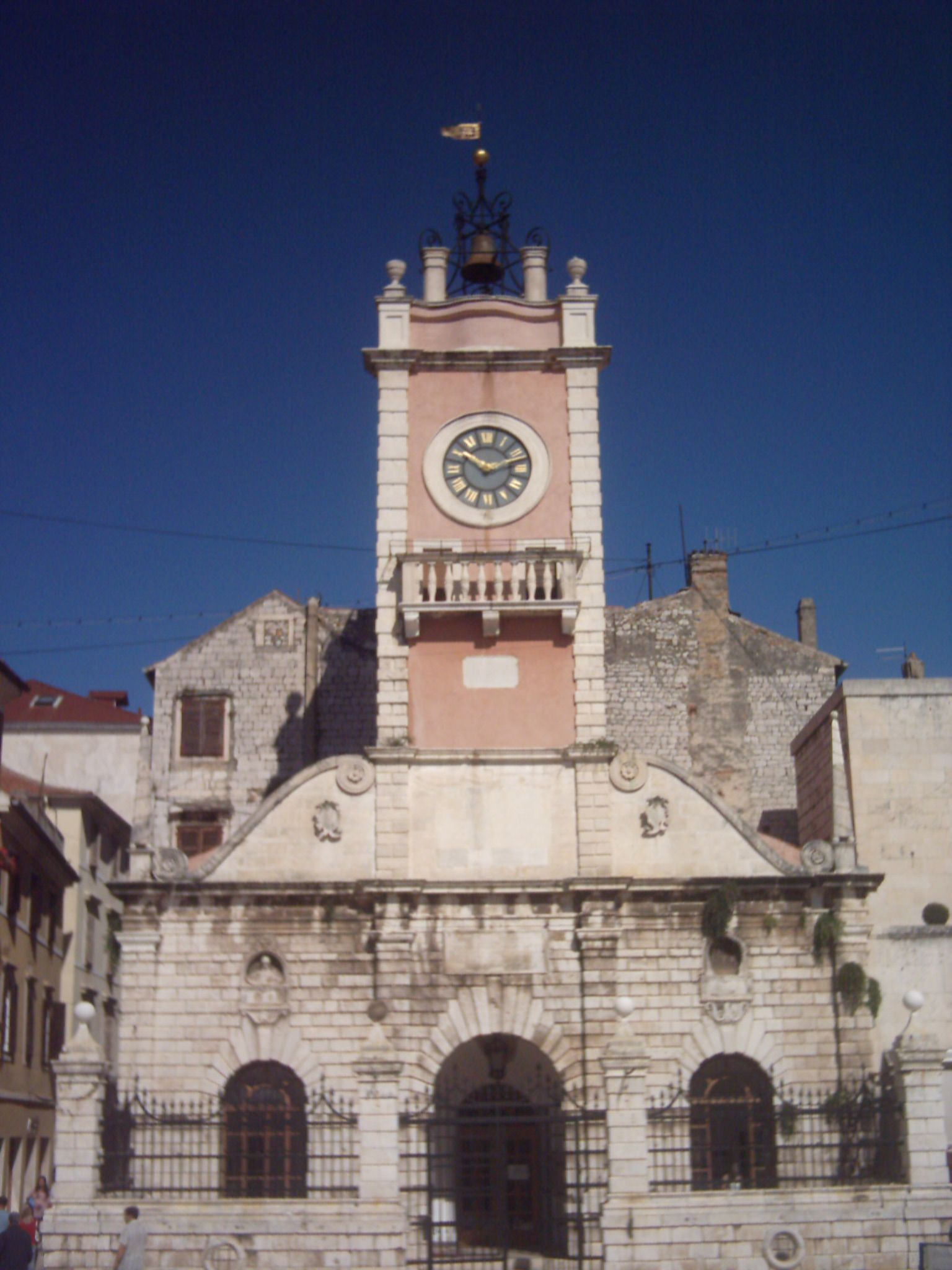 Gradska straža na Narodnom trgu u zadru